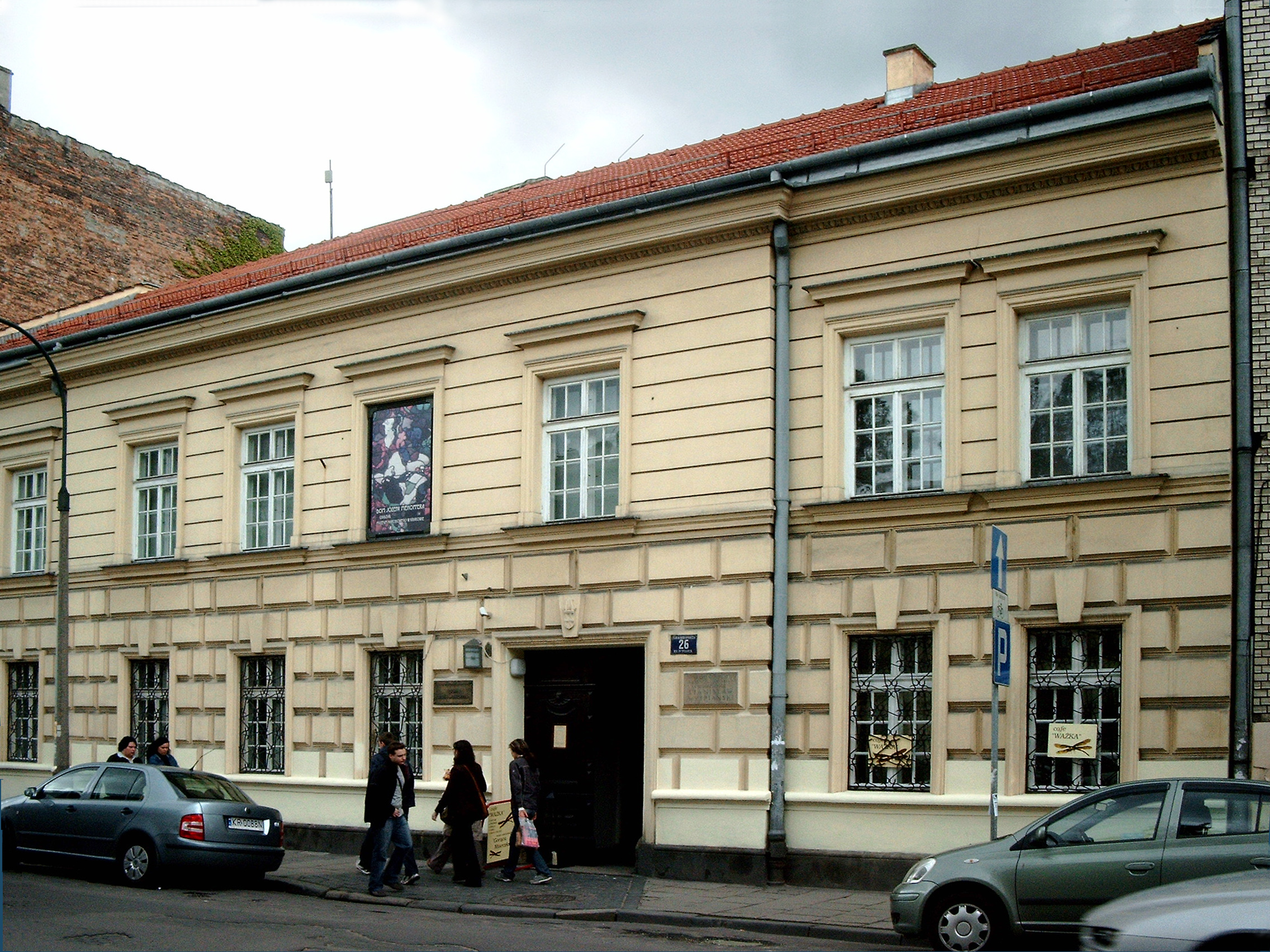 Dom Józefa Mehoffera, ul. Krupnicza, Kraków